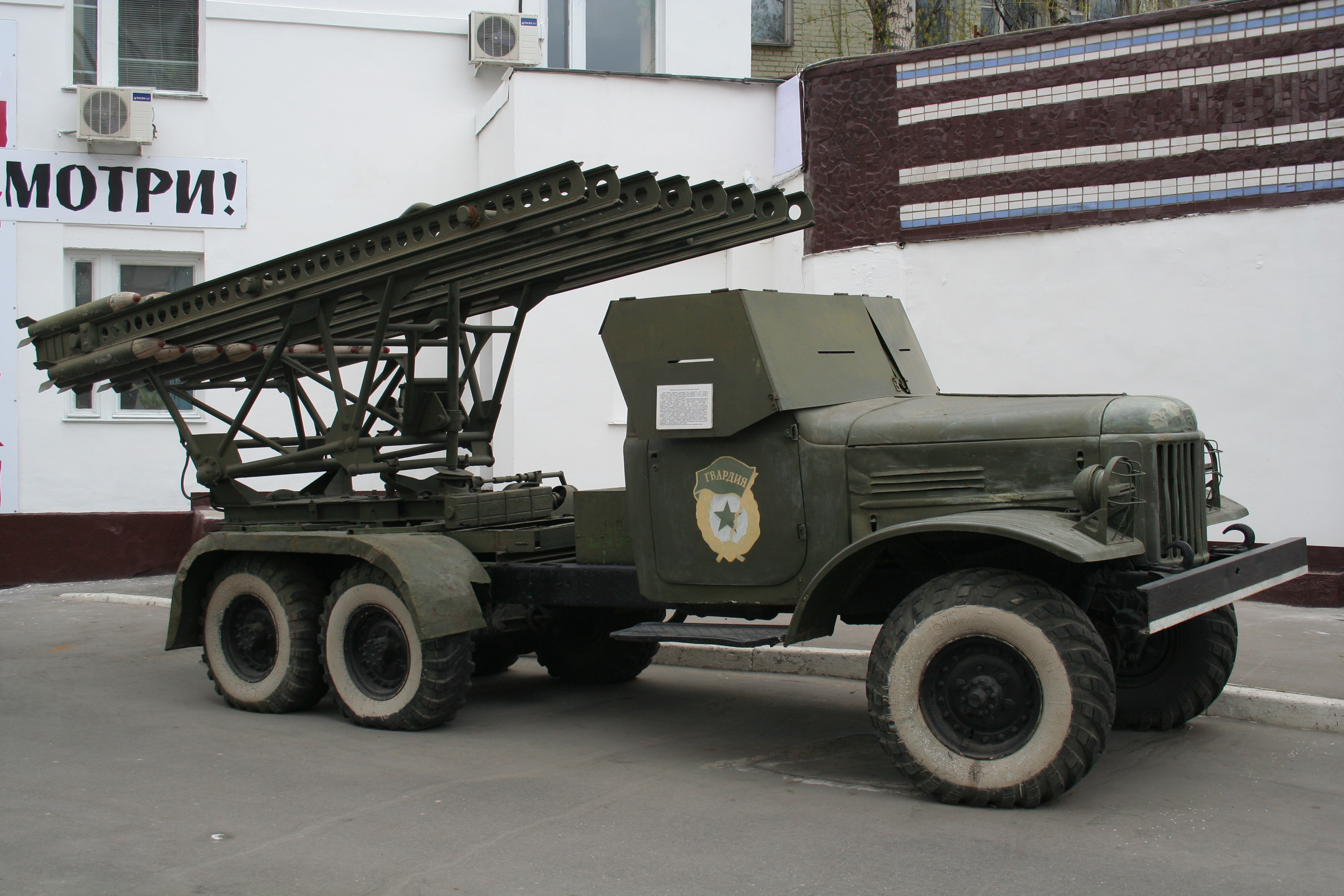 «Катюша» в Музее Москвы во дворе бывших Провиантских складов.